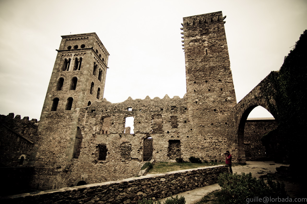 Monestir de Sant Pere de Rodes, o Sant Pere de Roda